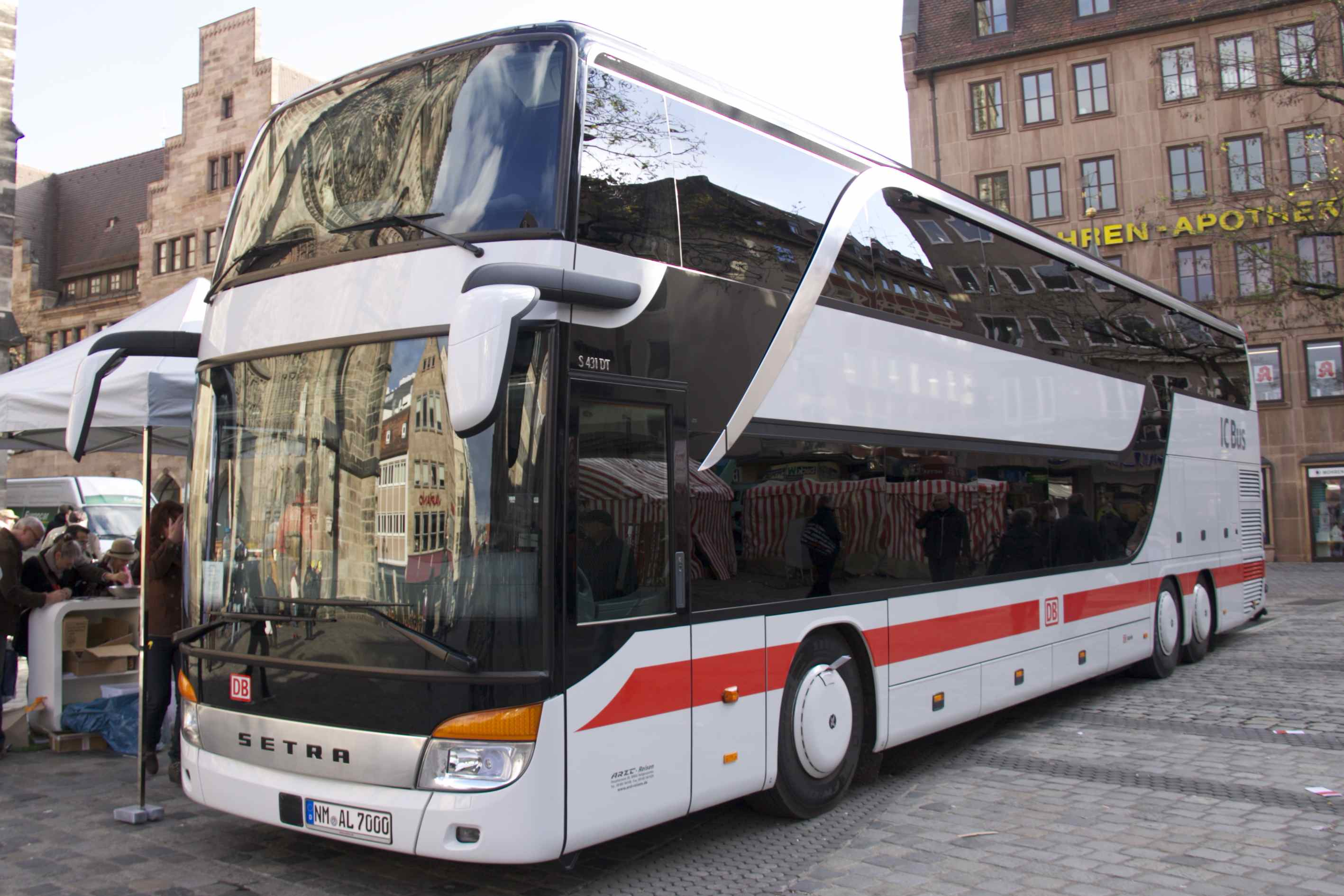 IC Bus Nürnberg